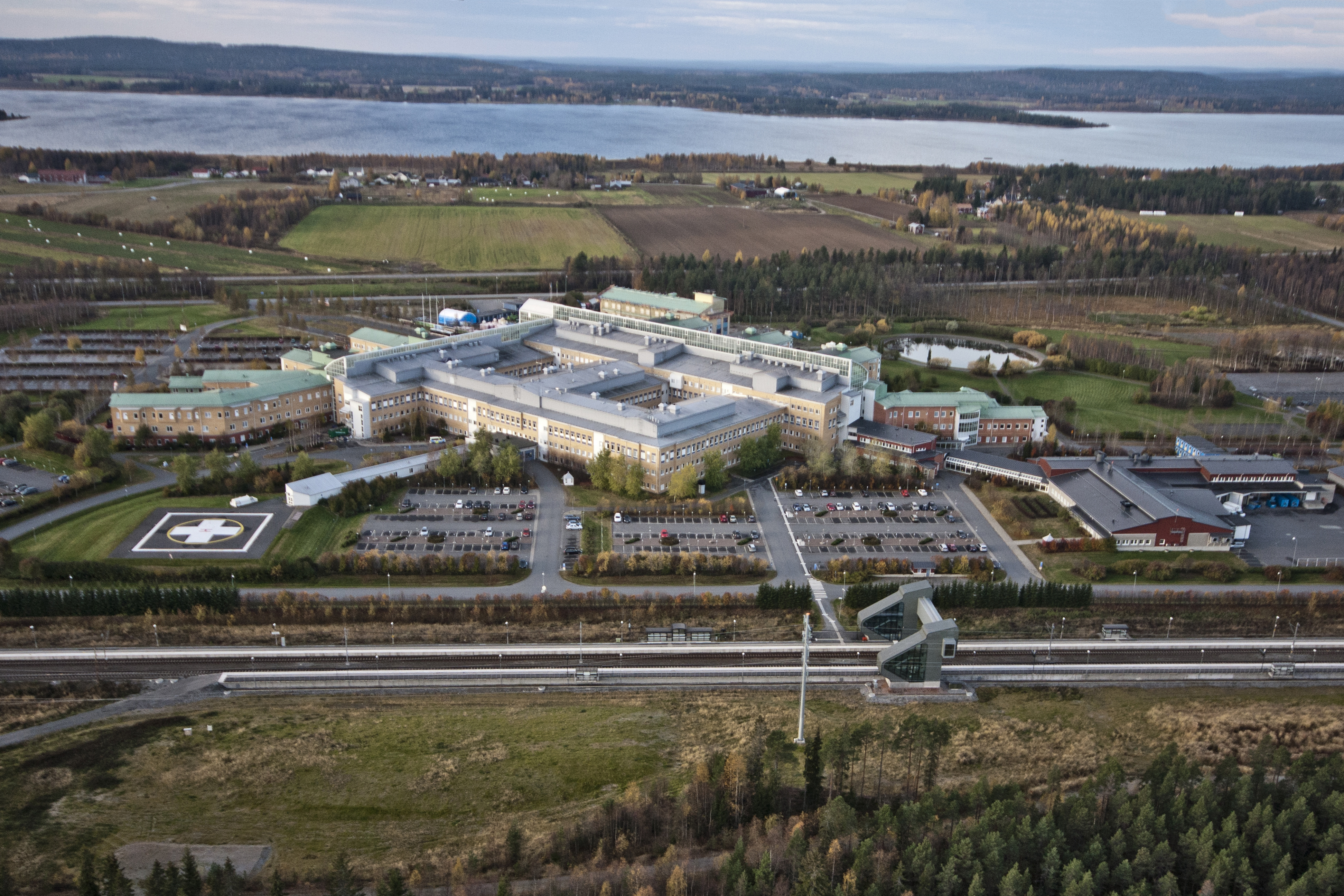 Flygfoto över Sunderby sjukhus